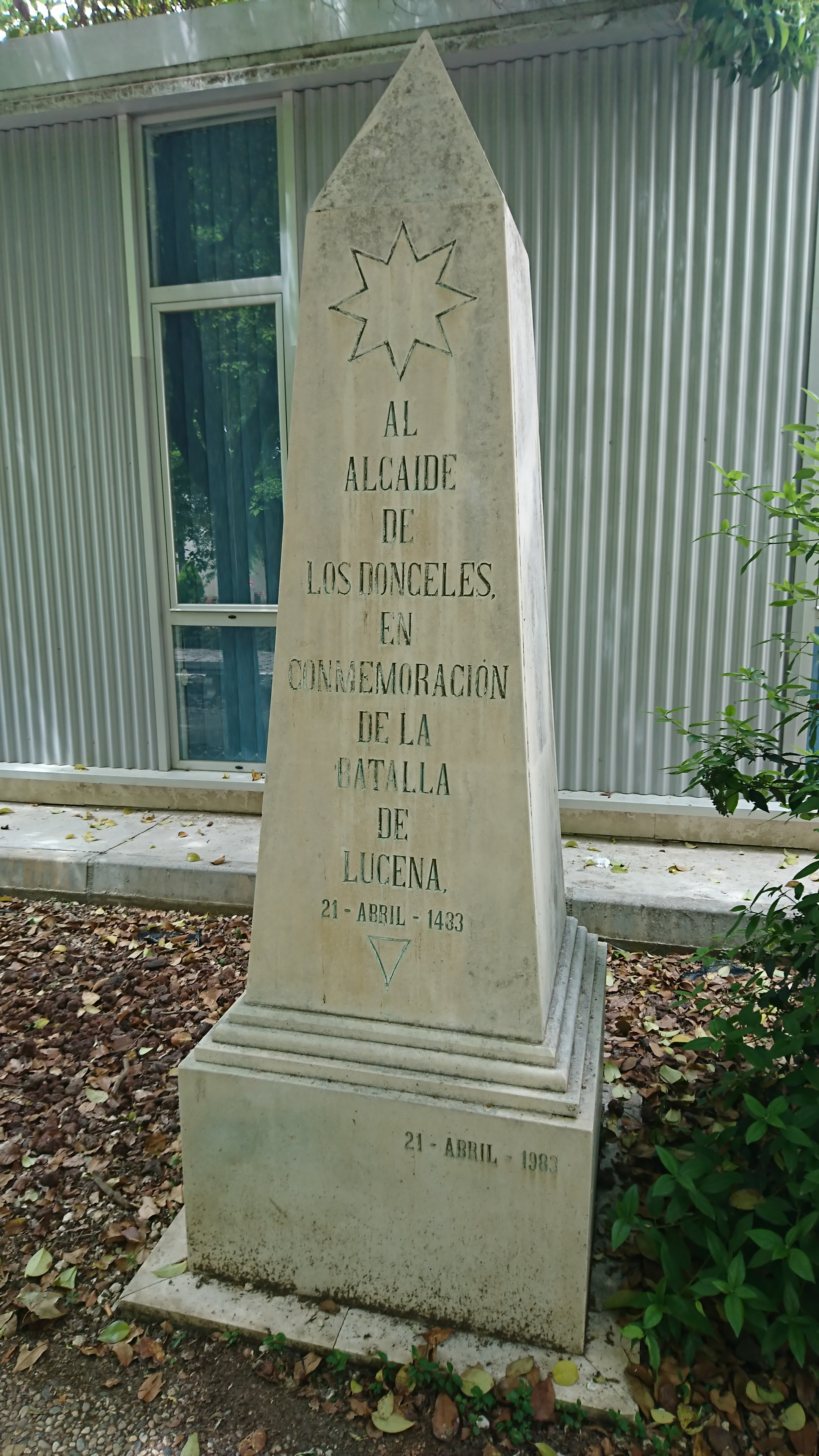 Obelisco que conmemora la Batalla de Lucena